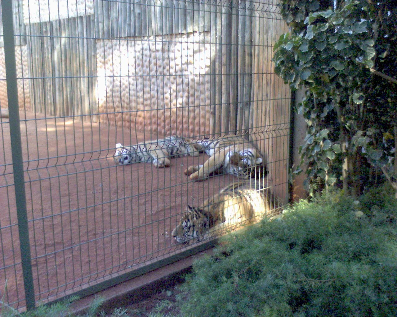 Recinto dos tigres - Parque Ecológico de Americana, São Paulo, Brasil